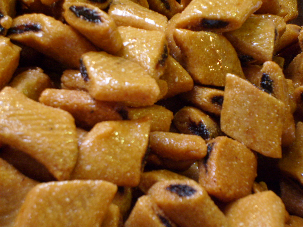 Makrouds aux dattes vendus dans la médina de Tunis (Tunisie)